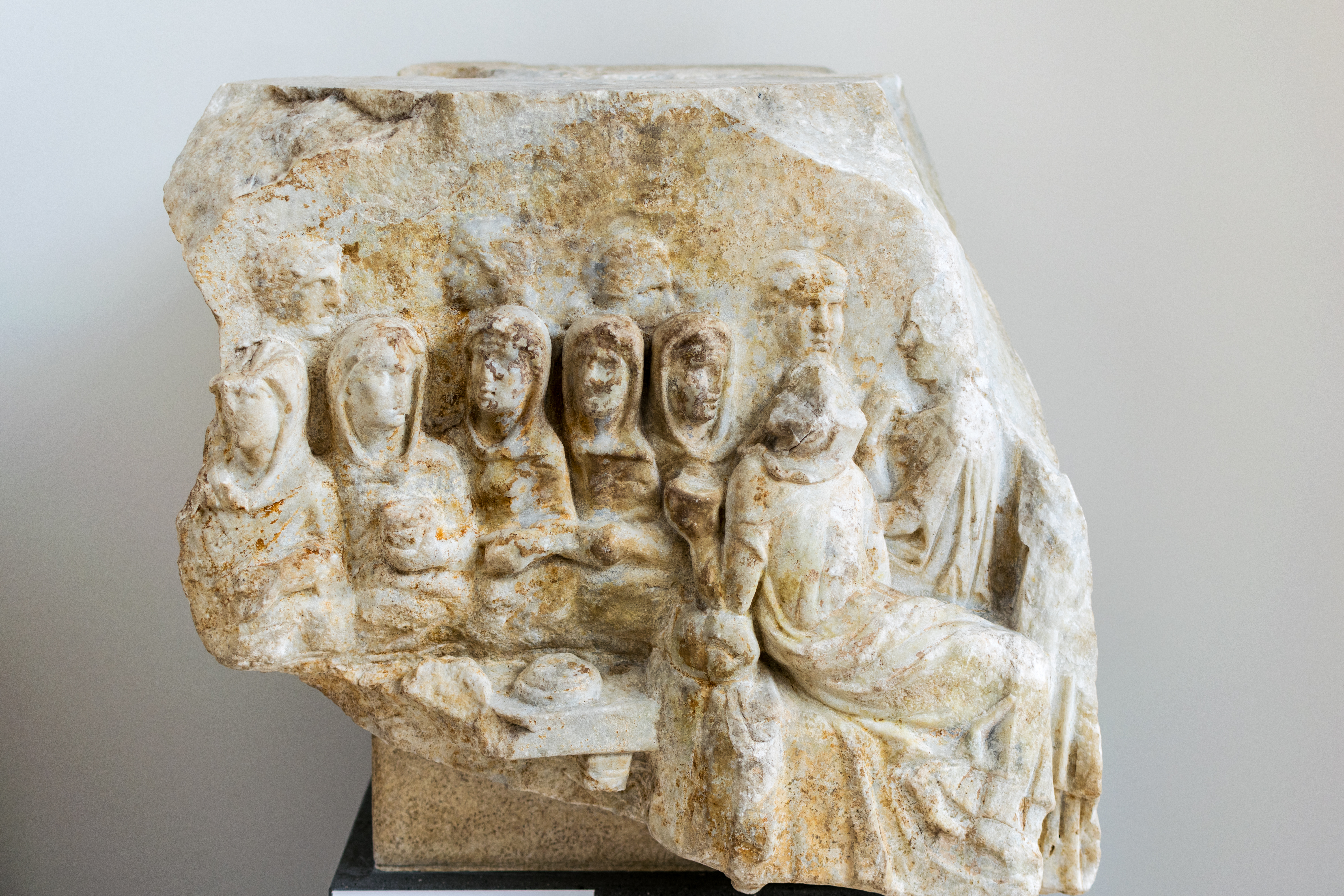 Marmorfragment aus Luna in Italien, das sitzende Vestalinnen bei einem Bankett zeigt. Das Fragment wurde 1935 auf der Ostseite der Via del Corso gefunden.